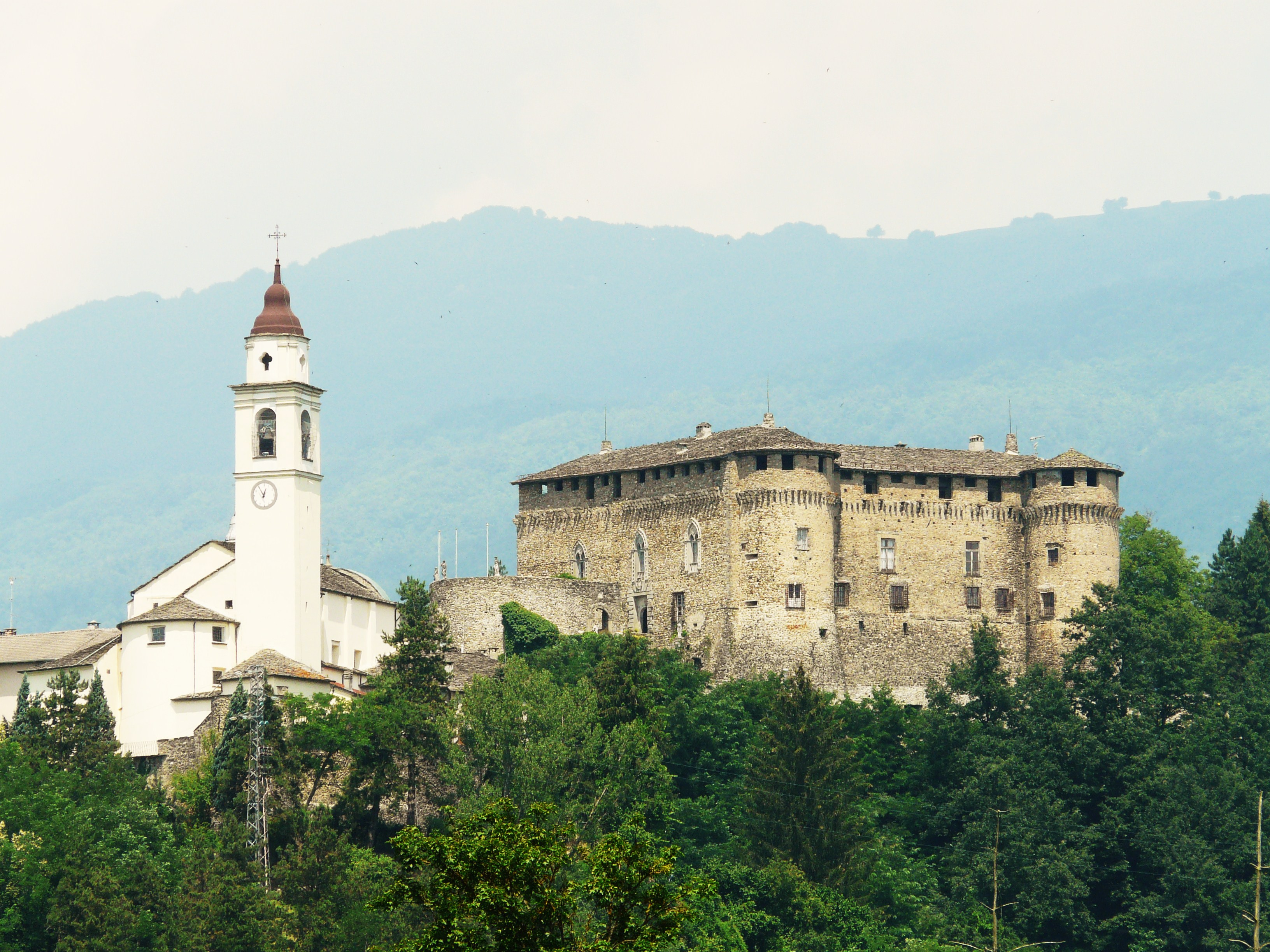 Compiano, Emilia Romagna, Italia